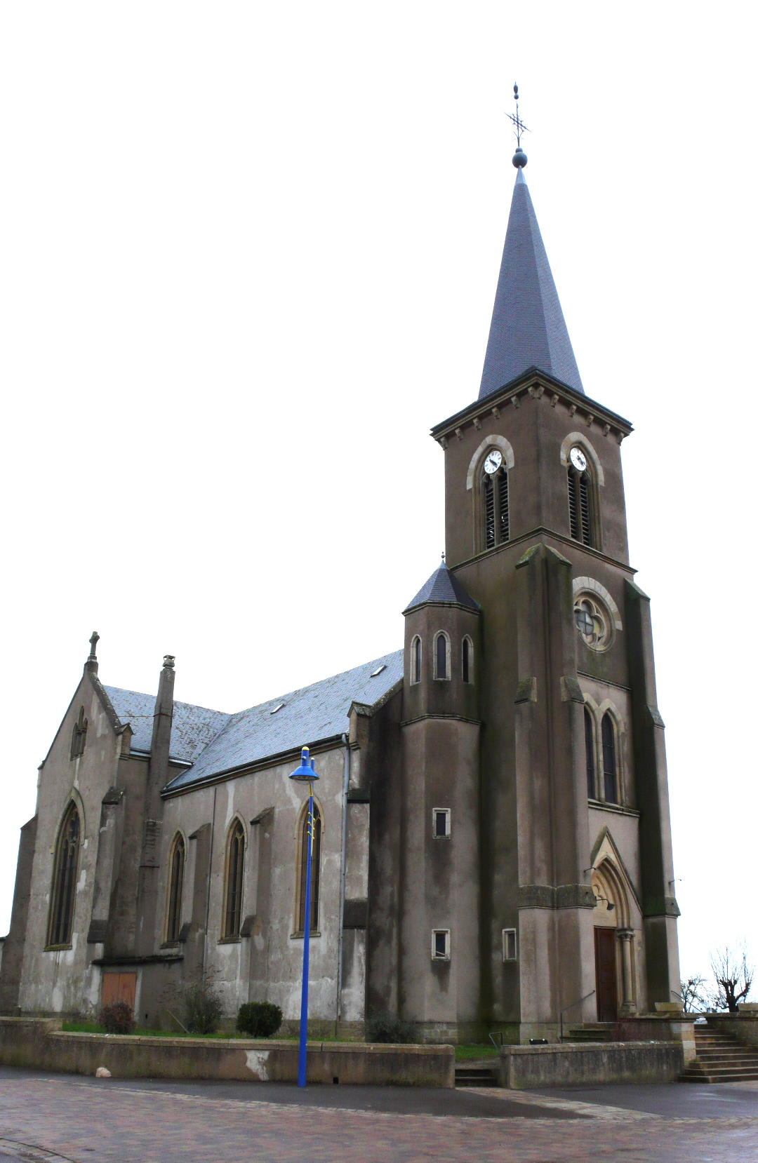 Kierch vu Zoufftgen.